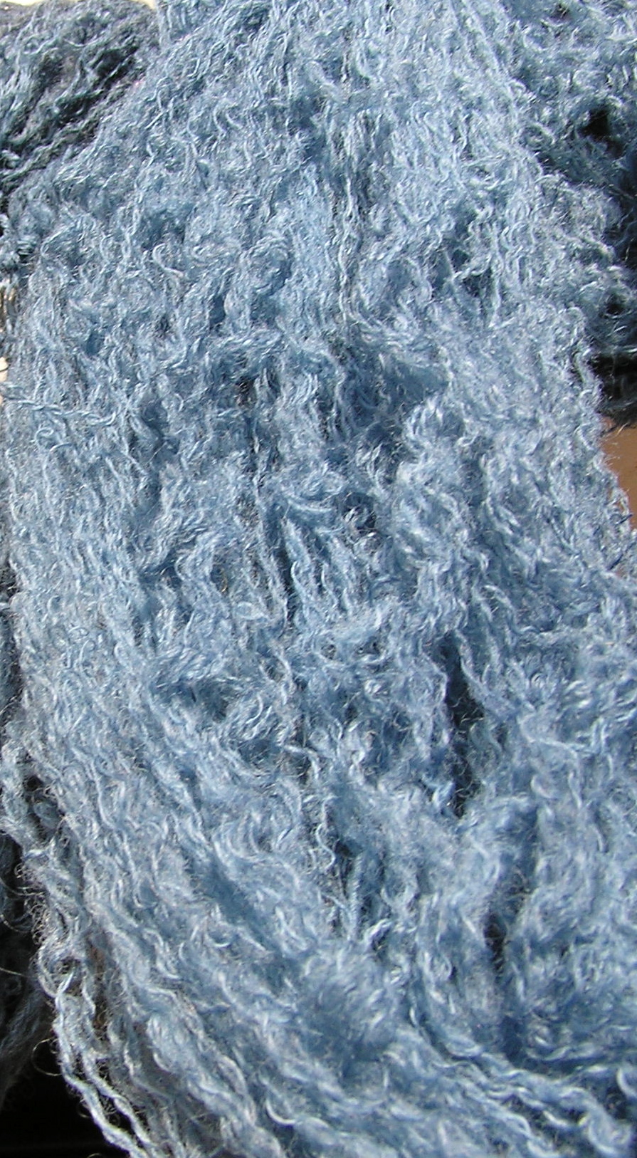 Yarn dyed with indigo